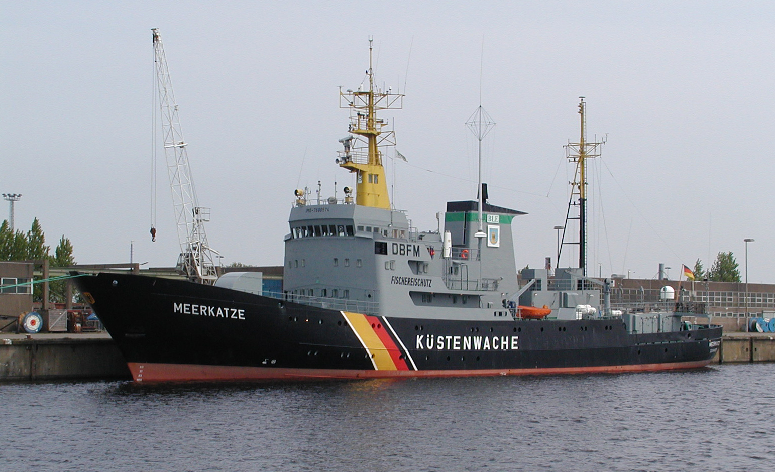 Das Schiff "Meerkatze" der Küstenwache IMO number : 7600574 Call Sign : DBFM Gross tonnage : 1812 Year of build : 1977